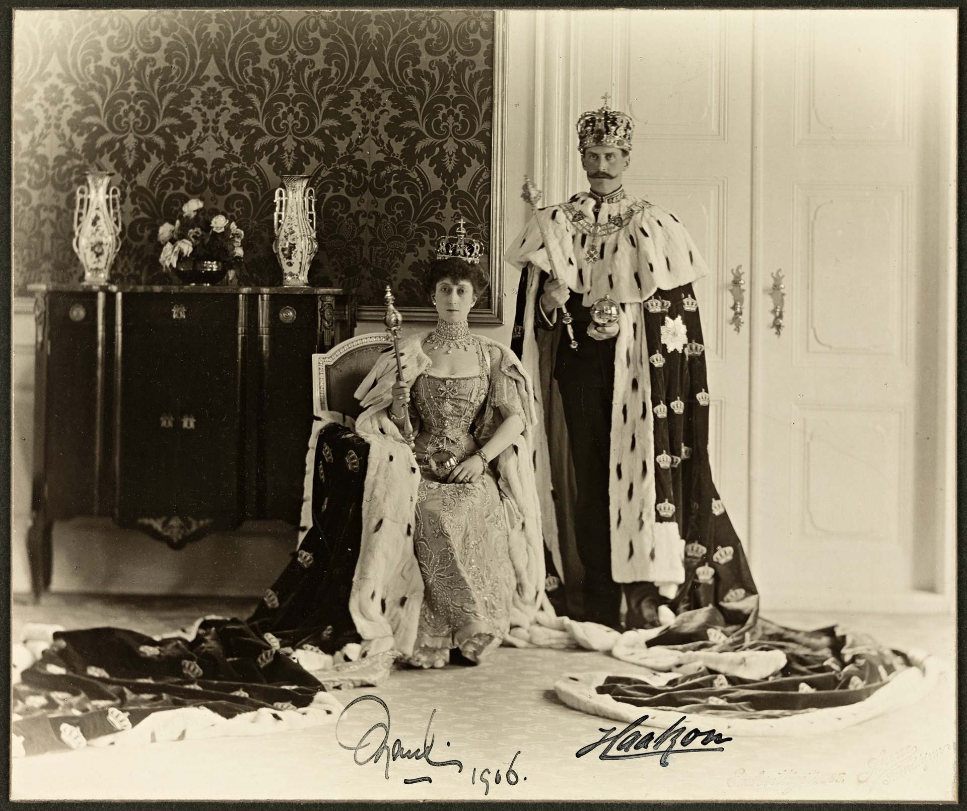 Tittel / Title: Dronning Maud (1869-1938) og Kong Haakon VII (1872-1957) / Queen Maud and King Haakon VII Motiv / Motif: Dette eksemplaret har tilhørt Fridtjof Nansen (1861-1930) Fotograf / Photographer: Peder O. Aune (Trondhjem) Sted / Place: Sør-Trøndelag, Trondheim Eier / Owner Institution: Nasjonalbiblioteket / National Library of Norway Lenke / Link: Bildesignatur / Image Number: blds_04776